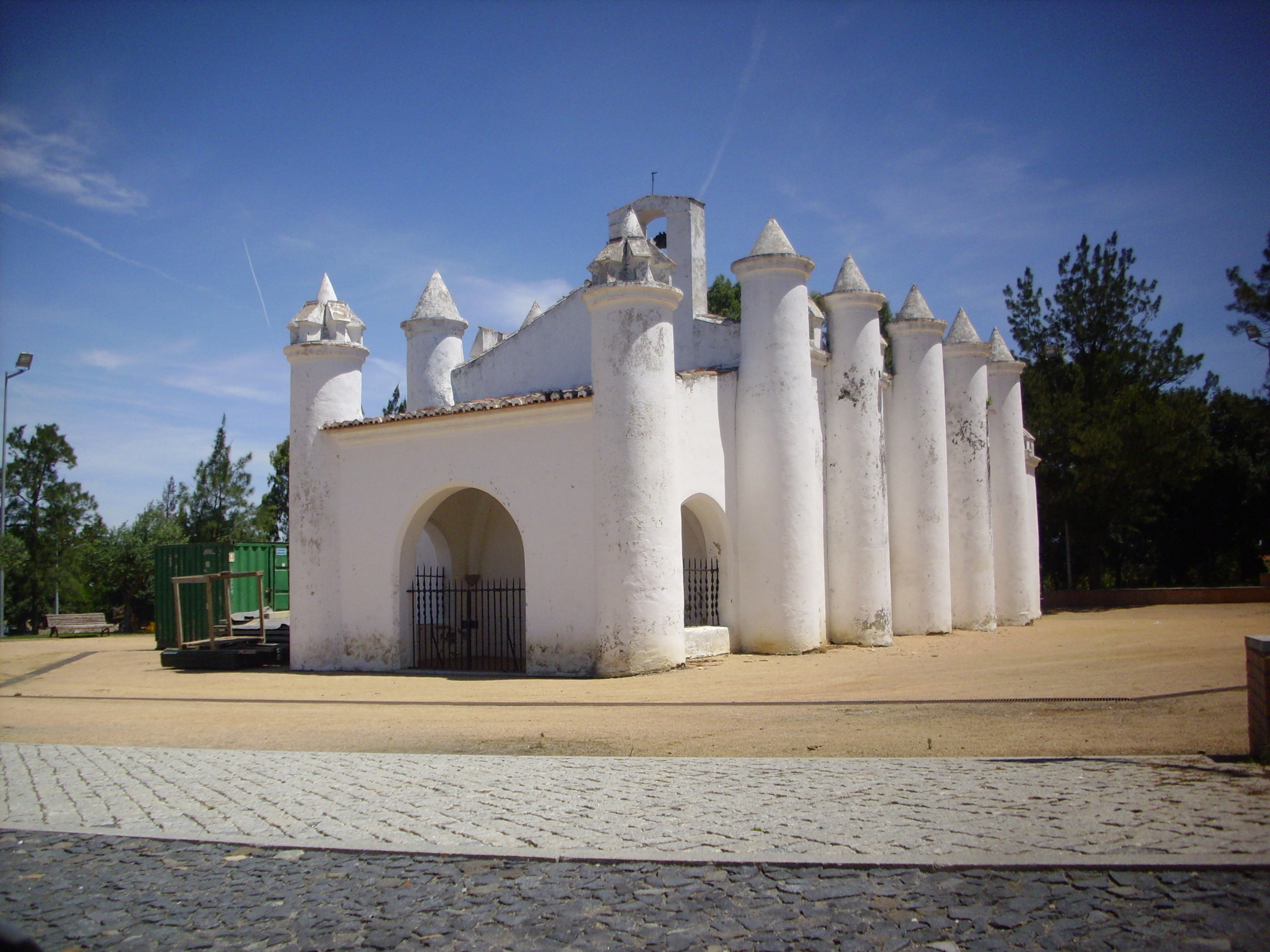 Cidade de Beja